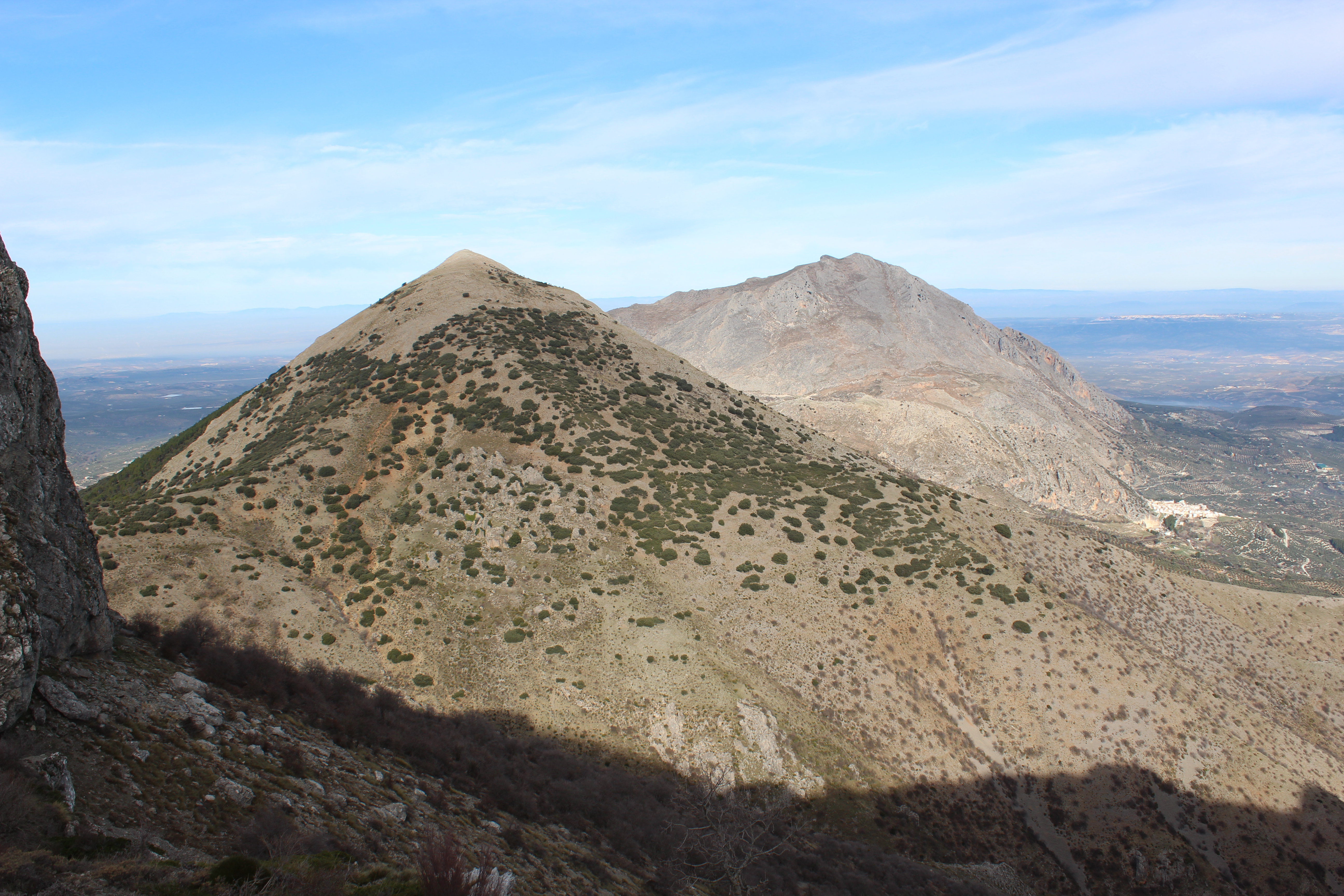 Cerro Monteagudo y Albanchez de Mágina a la derecha.